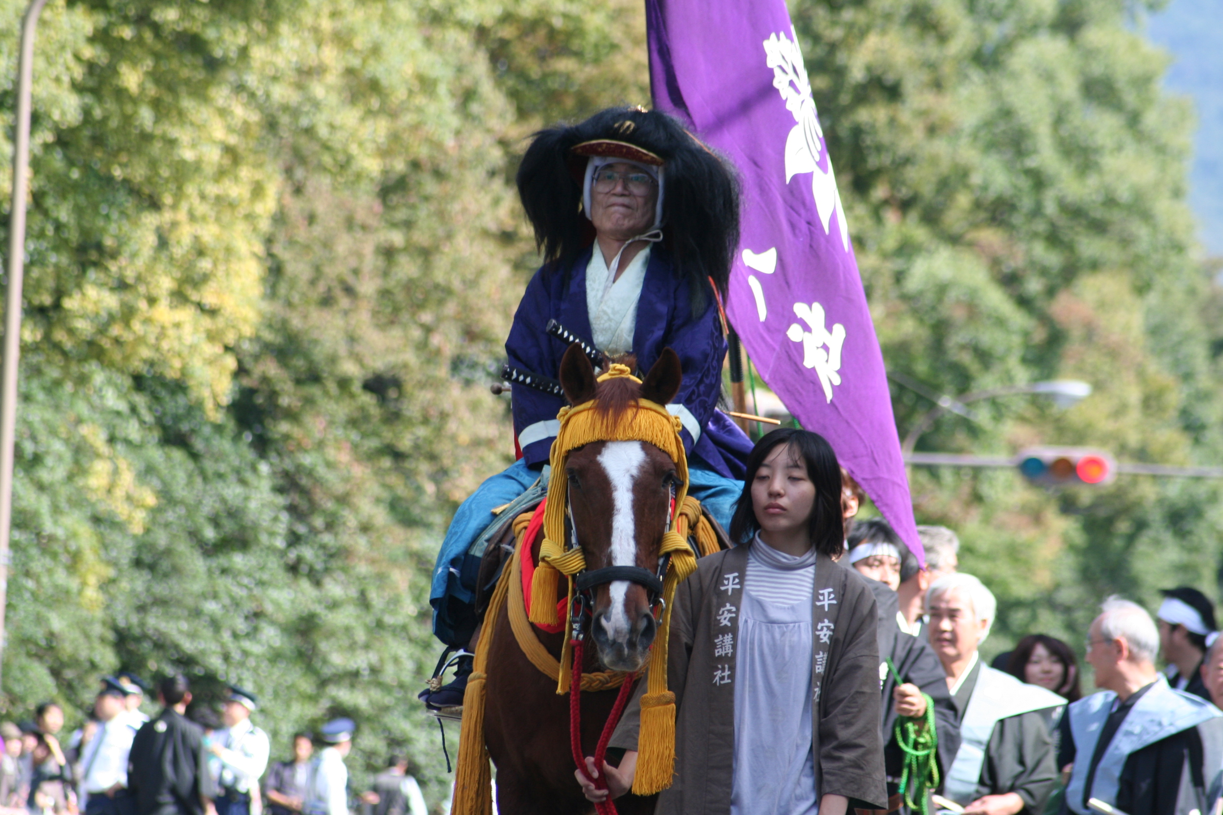 京都府京都市にて開催された時代祭。正午の御所から平安神宮までの行進の様子。2009年10月22日撮影。